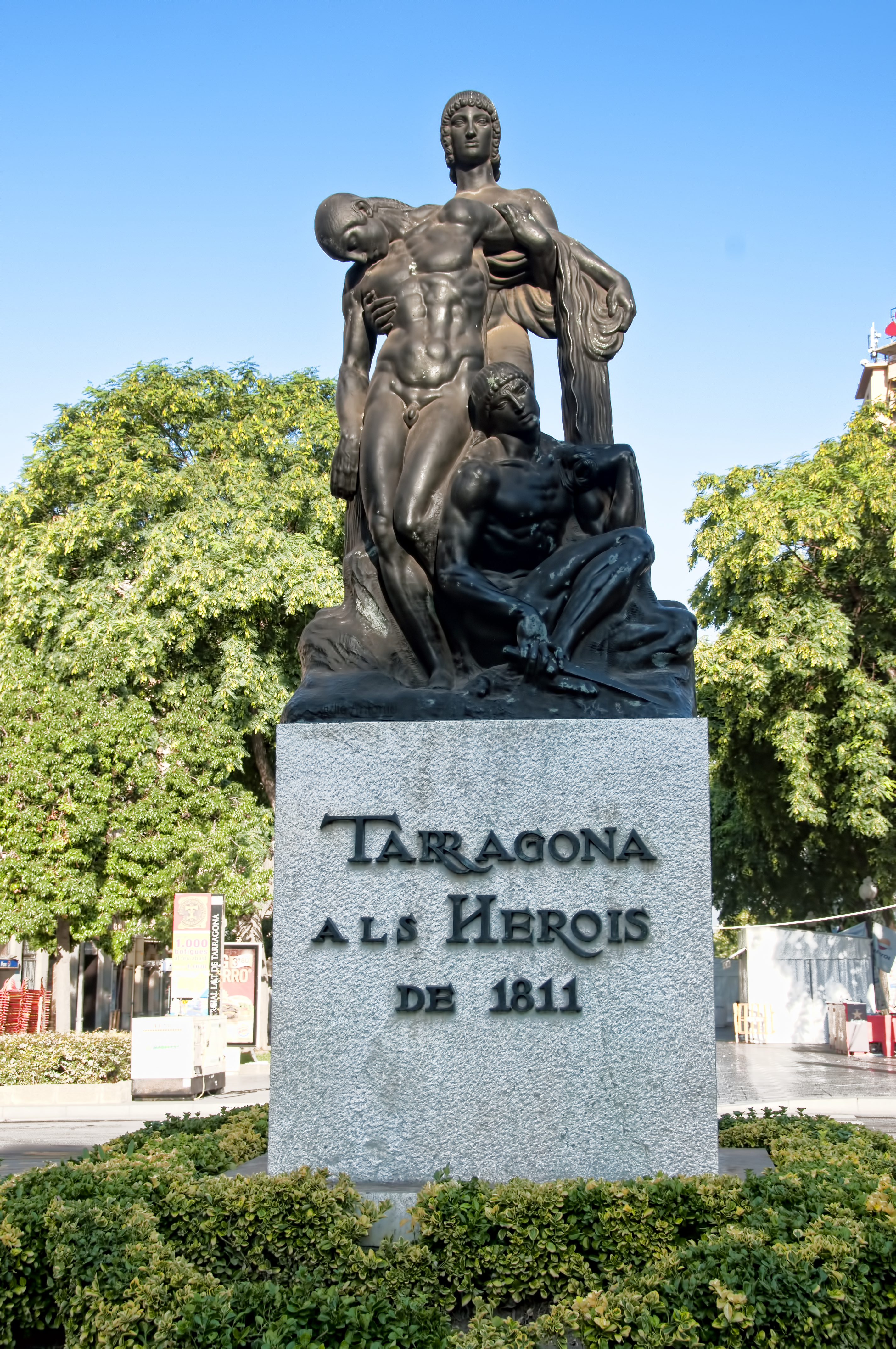 Monument als Herois de 1811